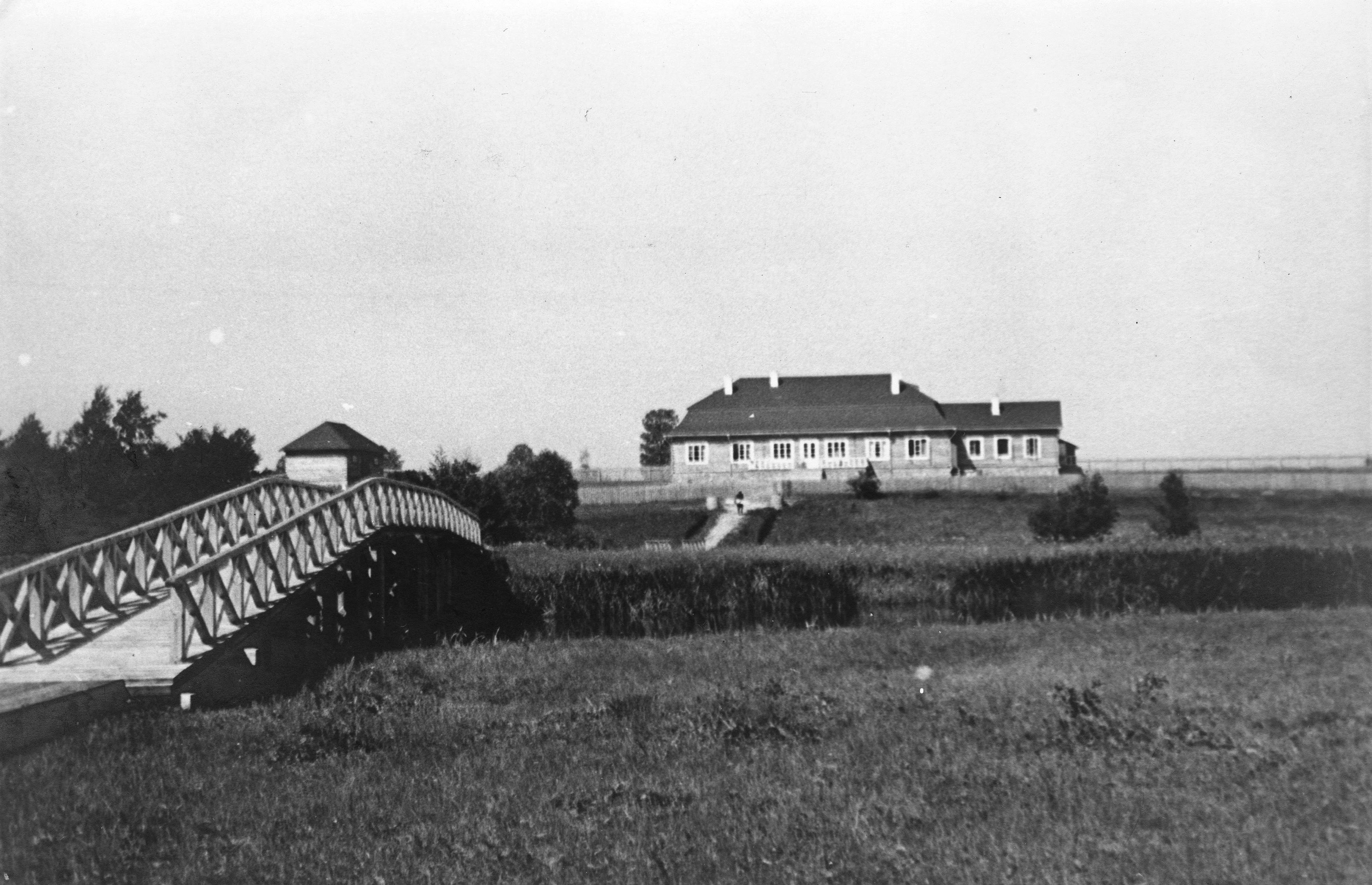 Беларуская (тарашкевіца): Жэмласлаў (Žemłasłaŭ), рака Гаўя (Gaŭja)